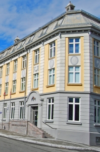 Nordnorsk Kunstmuseum i Kirkegata, Tromsø.